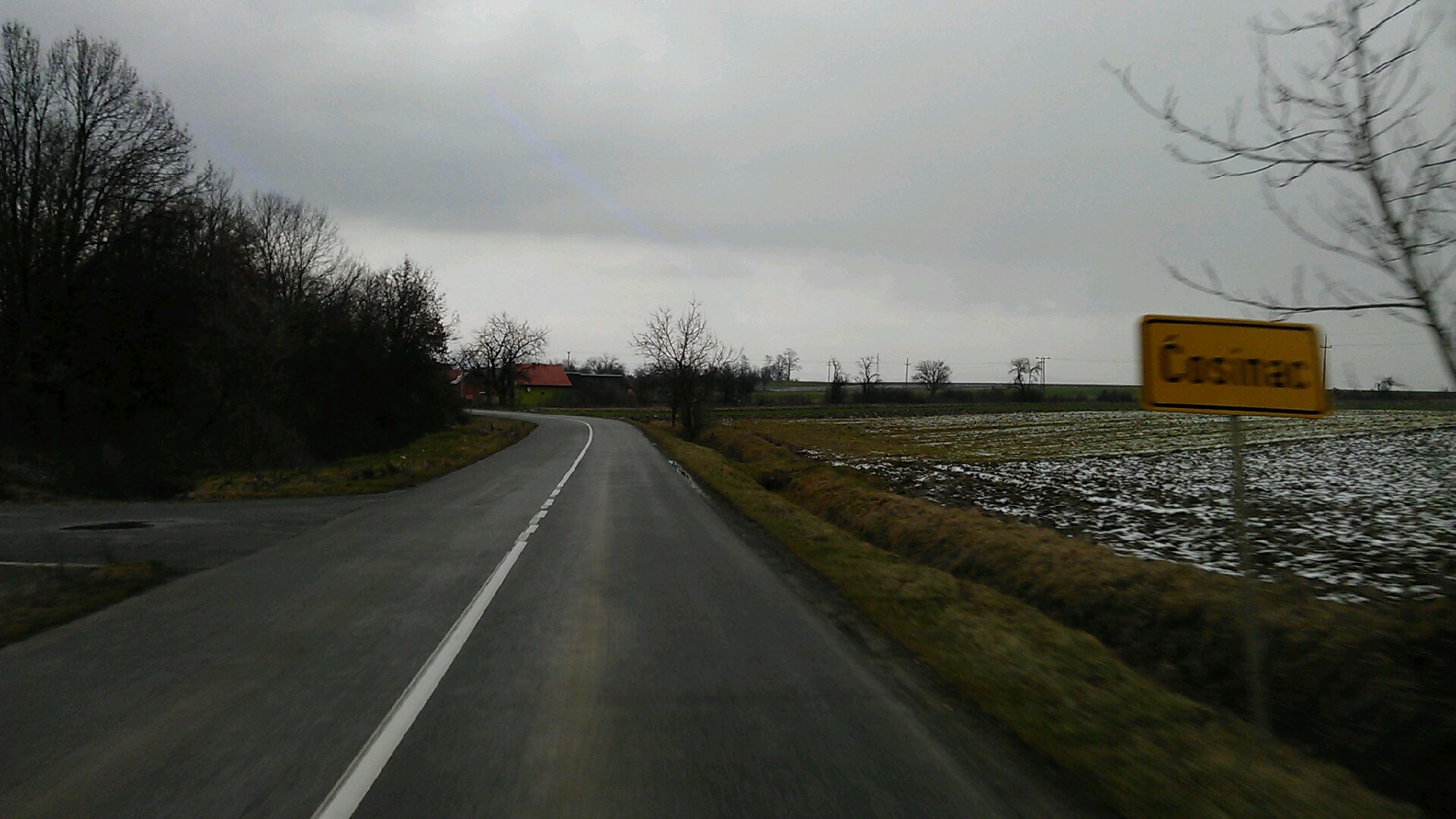 ćosinac